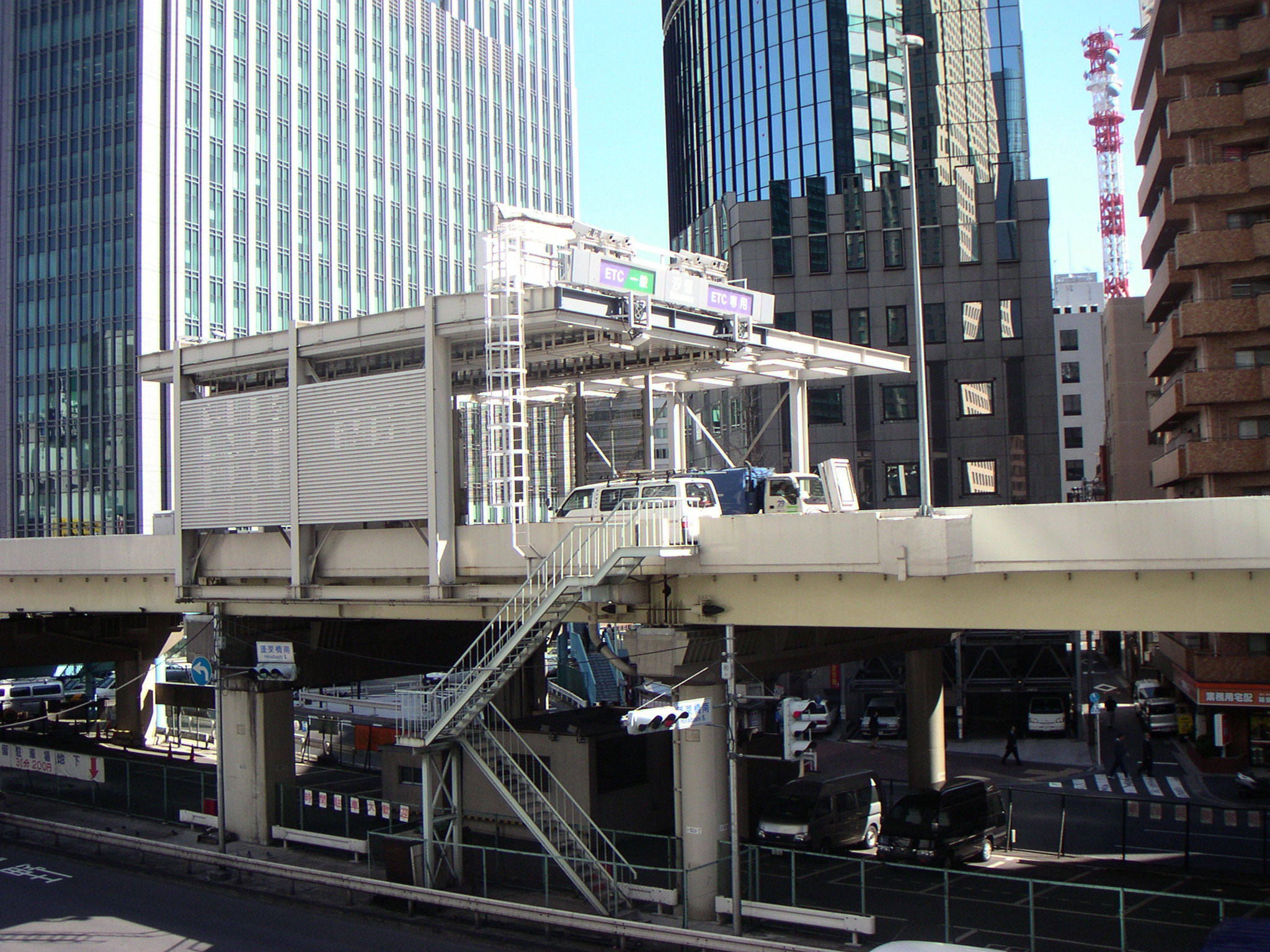 Shiodome Interchange, Chuo, Tokyo ja: 汐留インターチェンジ